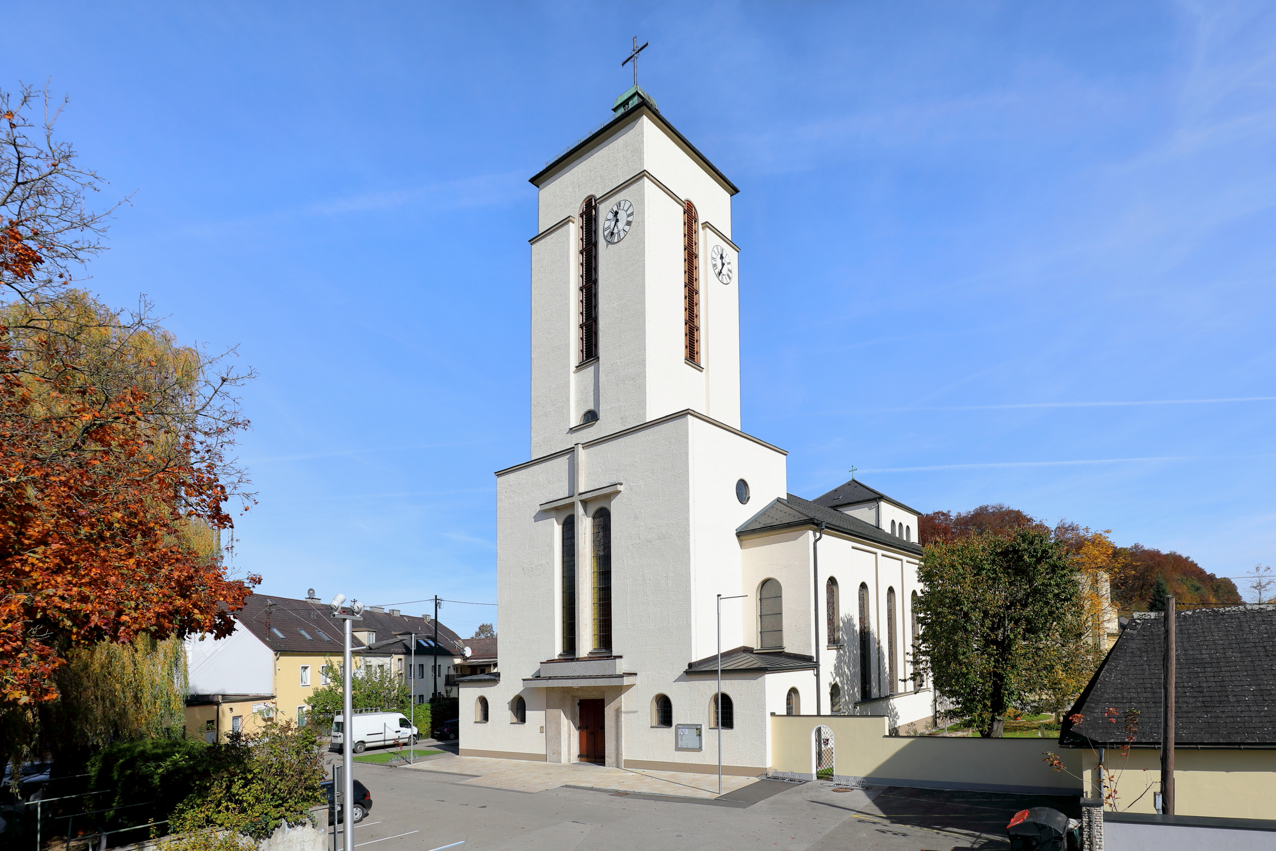 Südwestansicht der Pfarrkirche Hl. Geist in Attnang, ein Ortsteil der oberösterreichischen Stadt Attnang-Puchheim. Sie wurde von 1935 bis 1951 mit kriegsbedingter Unterbrechung und Bombenschäden nach den Plänen des Architekten Hans Feichtlbauer erbaut und am 9. September 1951 geweiht.